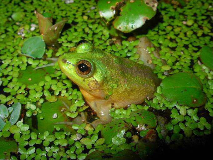 Pseudis paradoxa in Estación Biológica El Frio, Apure, Venezuela